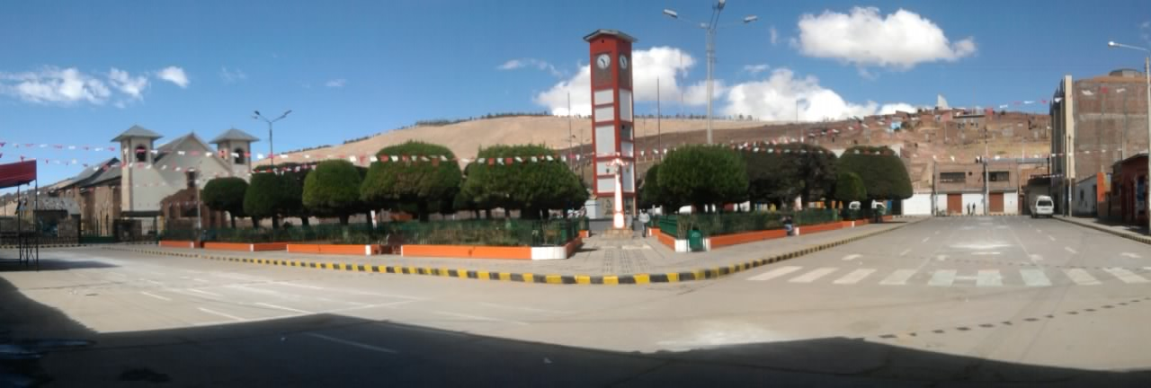 plaza de Huancané